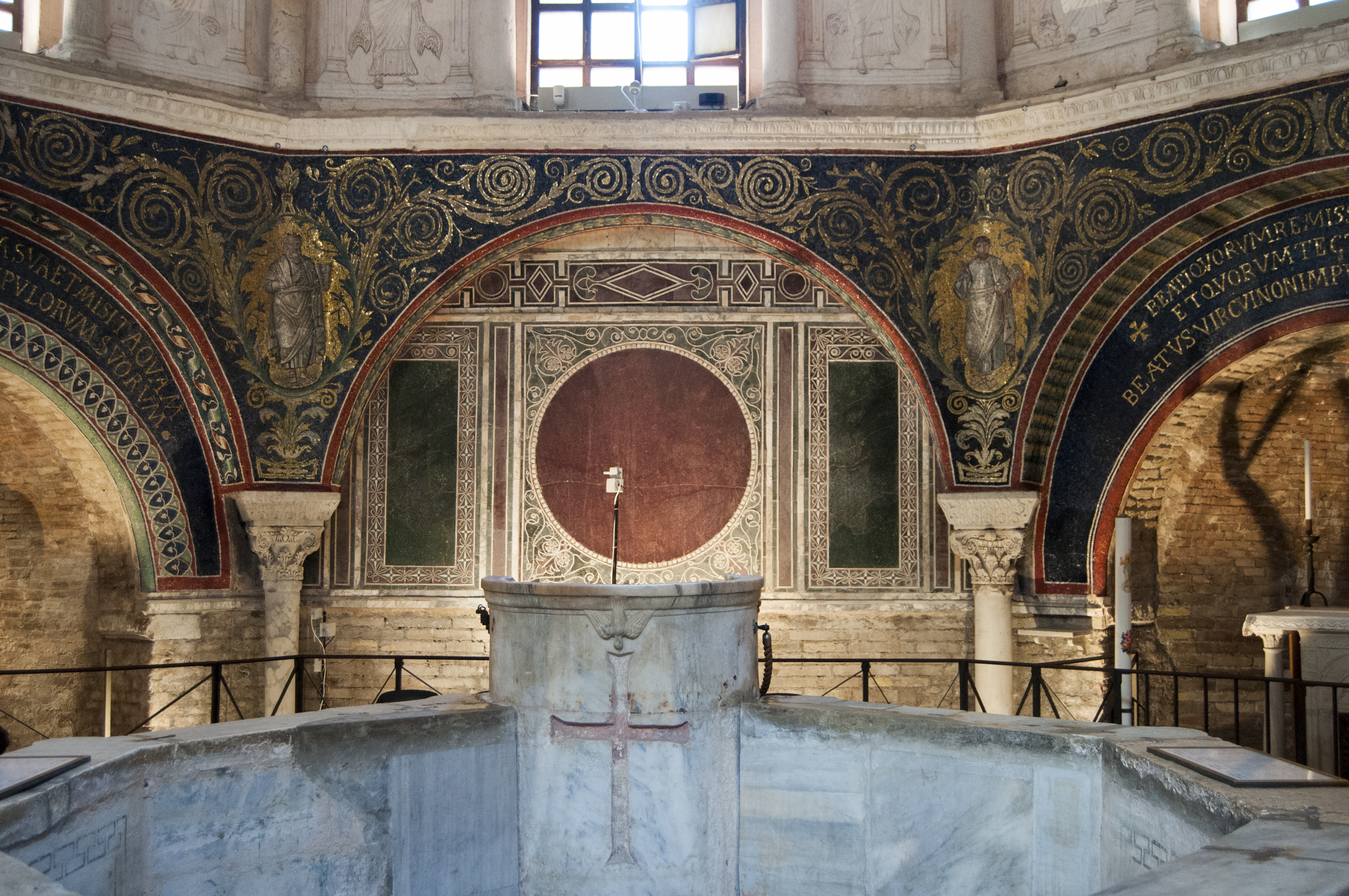 Battistero Neoniano - MIBAC This is a photo of a monument which is part of cultural heritage of Italy.